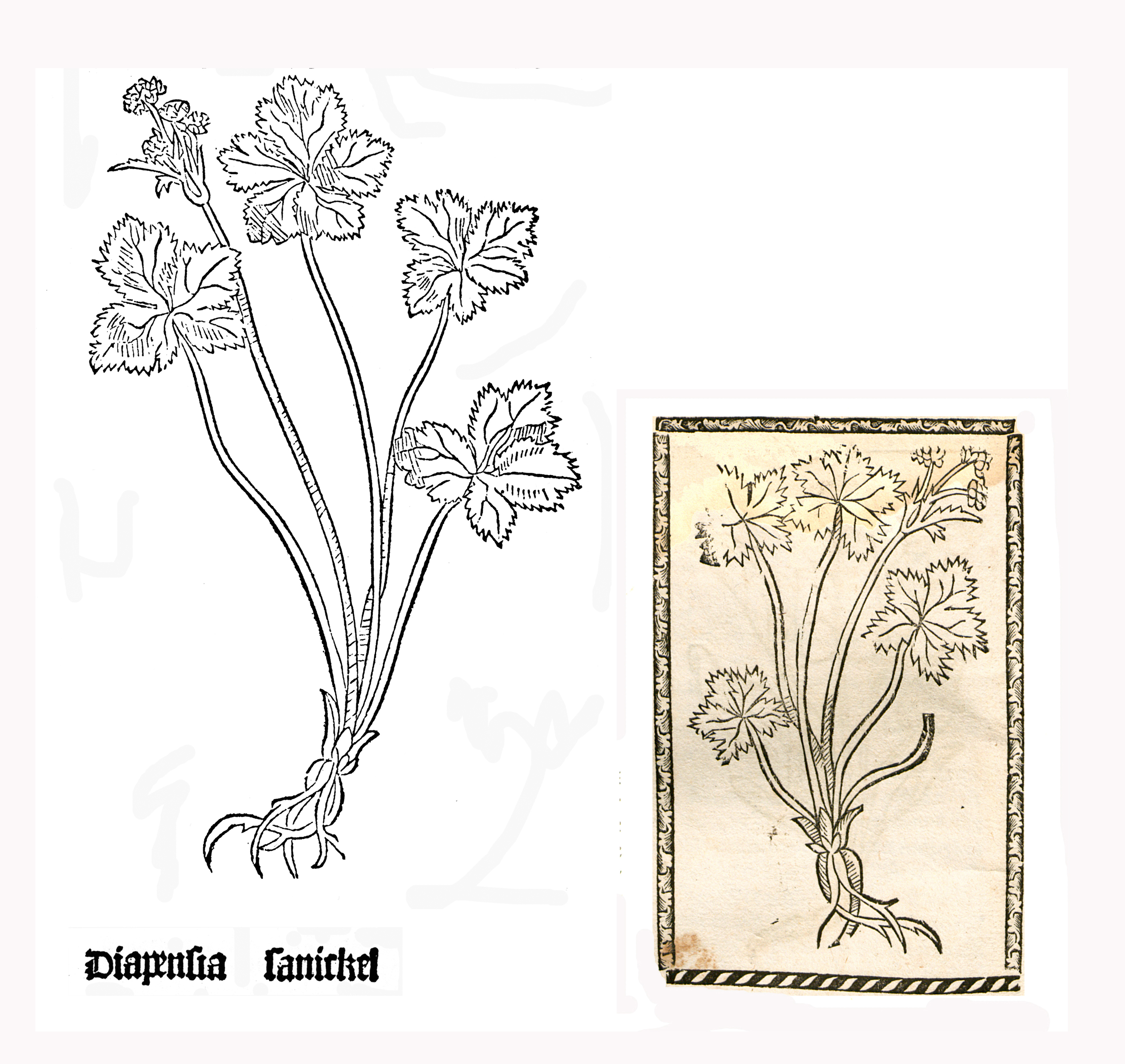 Abbildung von Sanickel (Sanicula europaea)